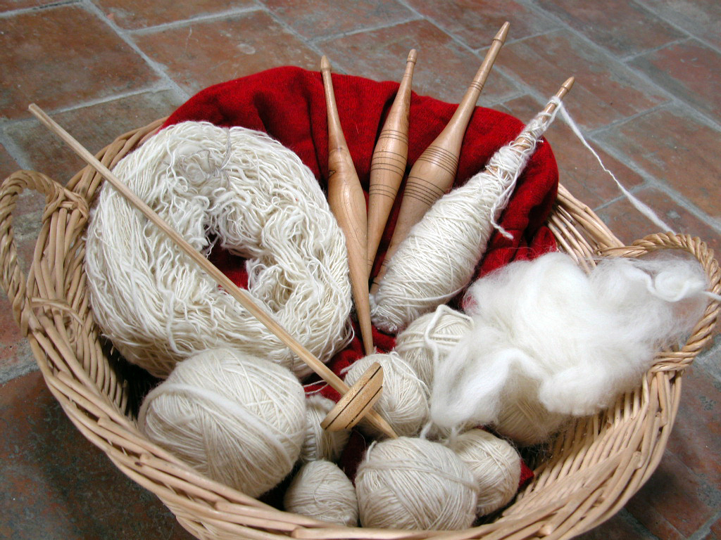 foto mia personale, giugno 2007 Licensing la licenza d uso e introvabile in questo sito .. Categoria:Immagini sulla tessitura